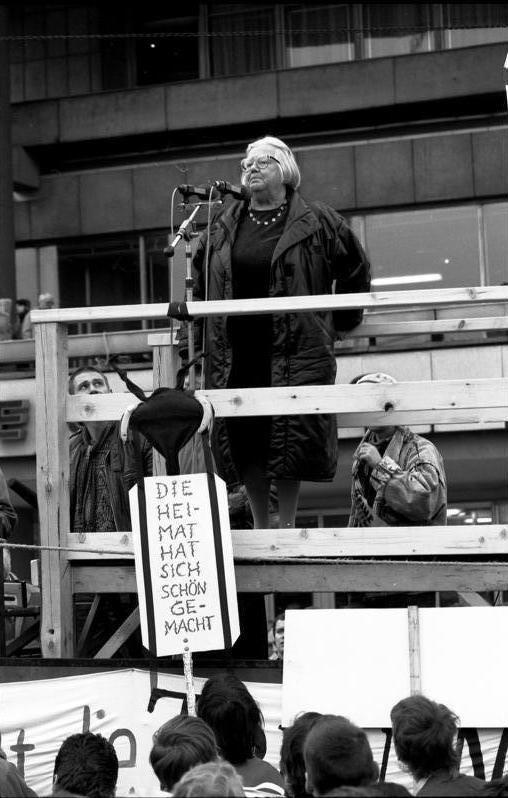 ADN-ZB/Link/ Berlin: Demonstration/ 500.000 Bürger beteiligten sich an einer Demonstration für den Inhalt der Artikel 27 und 28 der Verfassung der DDR. Auf dem anschließenden Meeting auf dem Alexanderplatz ergriff auch die Schauspielerin Steffie Spira das Wort.